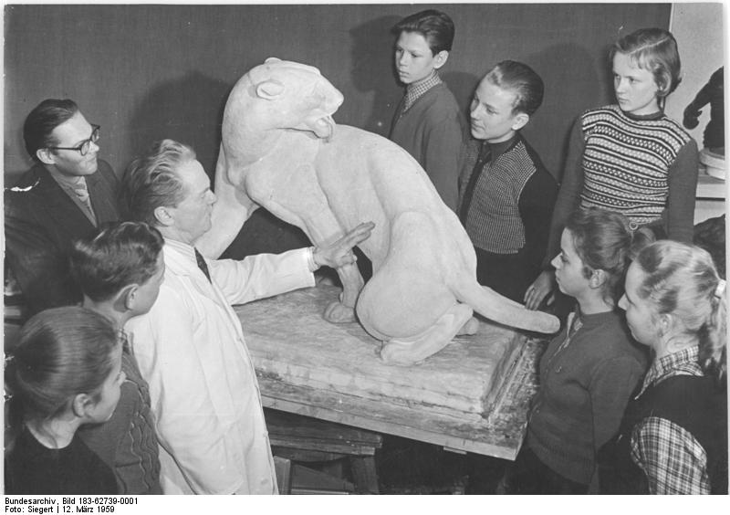 Meißen, Jugendstunde im Bildhaueratelier Zentralbild Siegert 12.3.1959 Jugendstunde im Tierbildhauer-Atelier Schüler der Klasse 8 b der 2. Mittelschule in Meißen besuchten zur Vorbereitung der Jugendweihe mit ihrem Lehrer den Tierbildhauer Erich Oehme. UBz: Herr Oehme erläutert den Schülern seine neueste Arbeit, einen Panther, den er im Auftrage des Tierparkes Berlin-Friedrichsfelde, geschaffen hat.